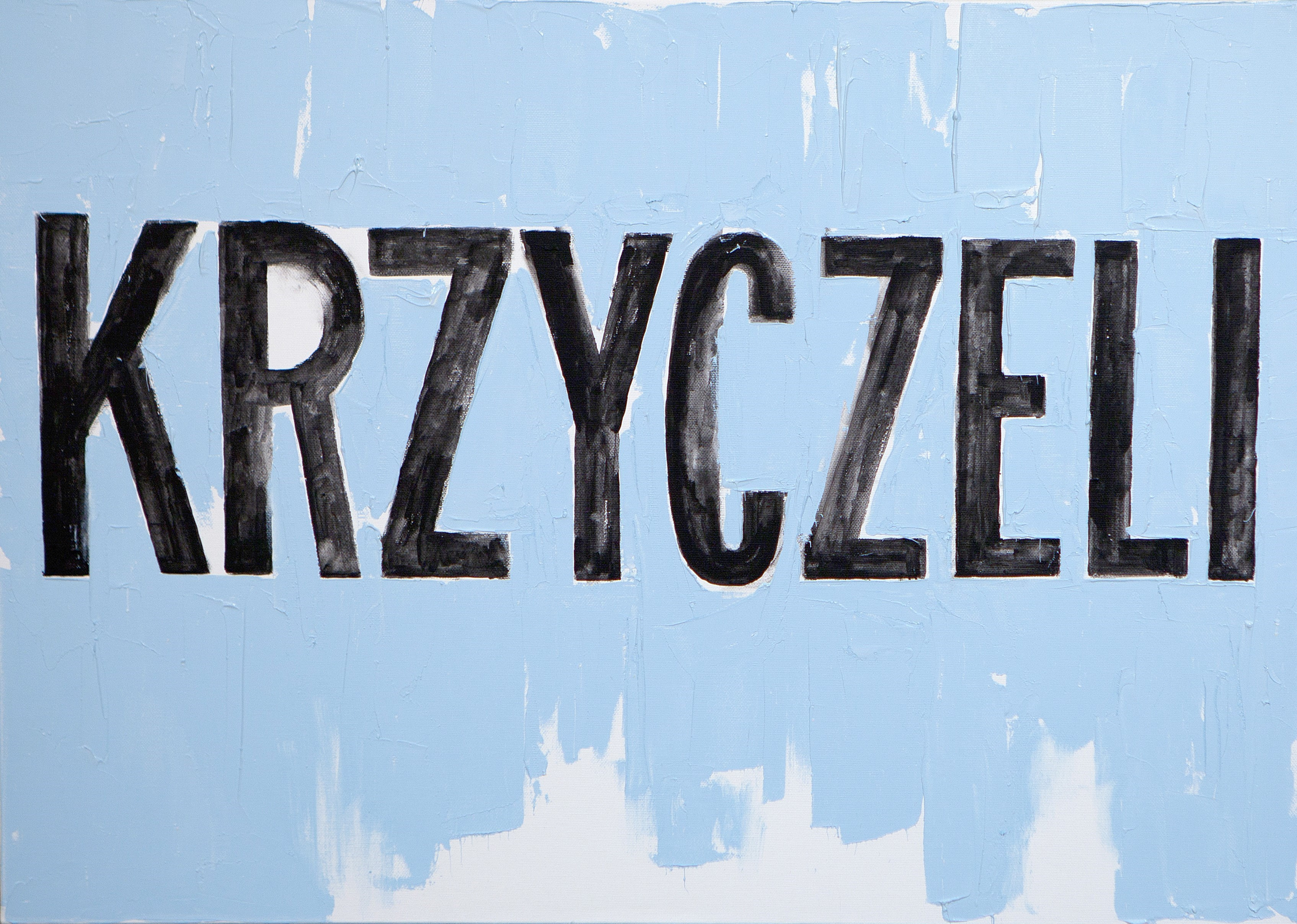 Obrazy prezentowane na wystawie podejmują temat klisz językowych obecnych w debacie publicznej w Polsce XXI wieku oraz kryjących się za nimi ideologii. Sawicka używa słów o silnym emocjonalnym zabarwieniu – płakali, krzyczeli, zginęli. Czasowniki są w czasie przeszłym, nie wiadomo jednak czy odnoszą się do historii czy aktualnych wydarzeń. Stawia tym samym pytanie o przenikanie zwrotów charakterystycznych dla narracji o przeszłości do języka aktualnej debaty i zasadność tworzonych w ten sposób analogii. Sawicka uprawia sztukę na bazie językowych resztek, sloganów z politycznych transparentów, nagłówków z tabloidów, wiadomości telewizyjnych. Jest malarką konkretnych czasów, czujnie dokumentującą polityczny spór polaryzujący współczesną Polskę. Pokazuje światopoglądowe niekonsekwencje, tropi niespójne tożsamości uczestników sporu.